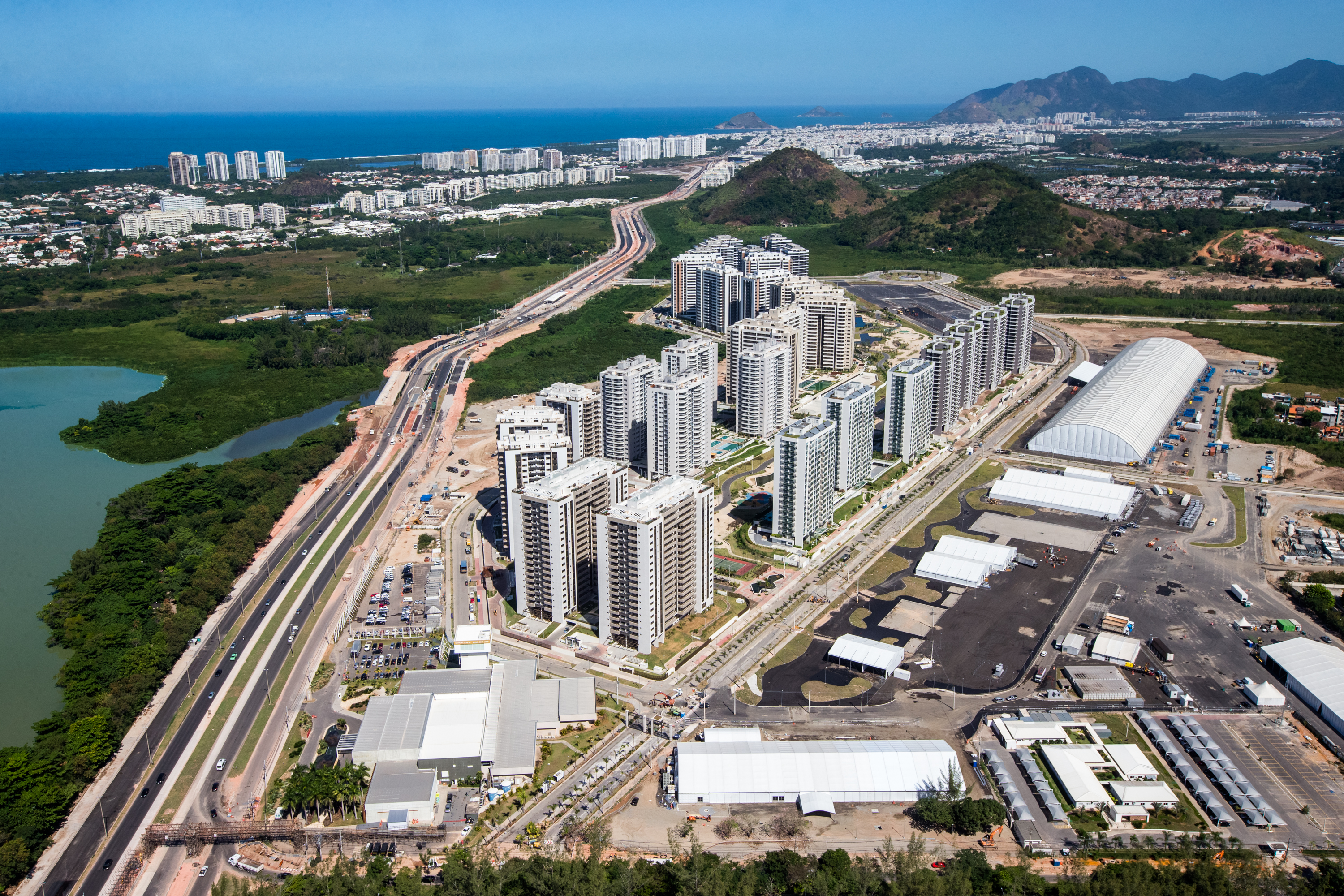 القرية الأولمبية لدورة الالعاب الأولمبية 2016